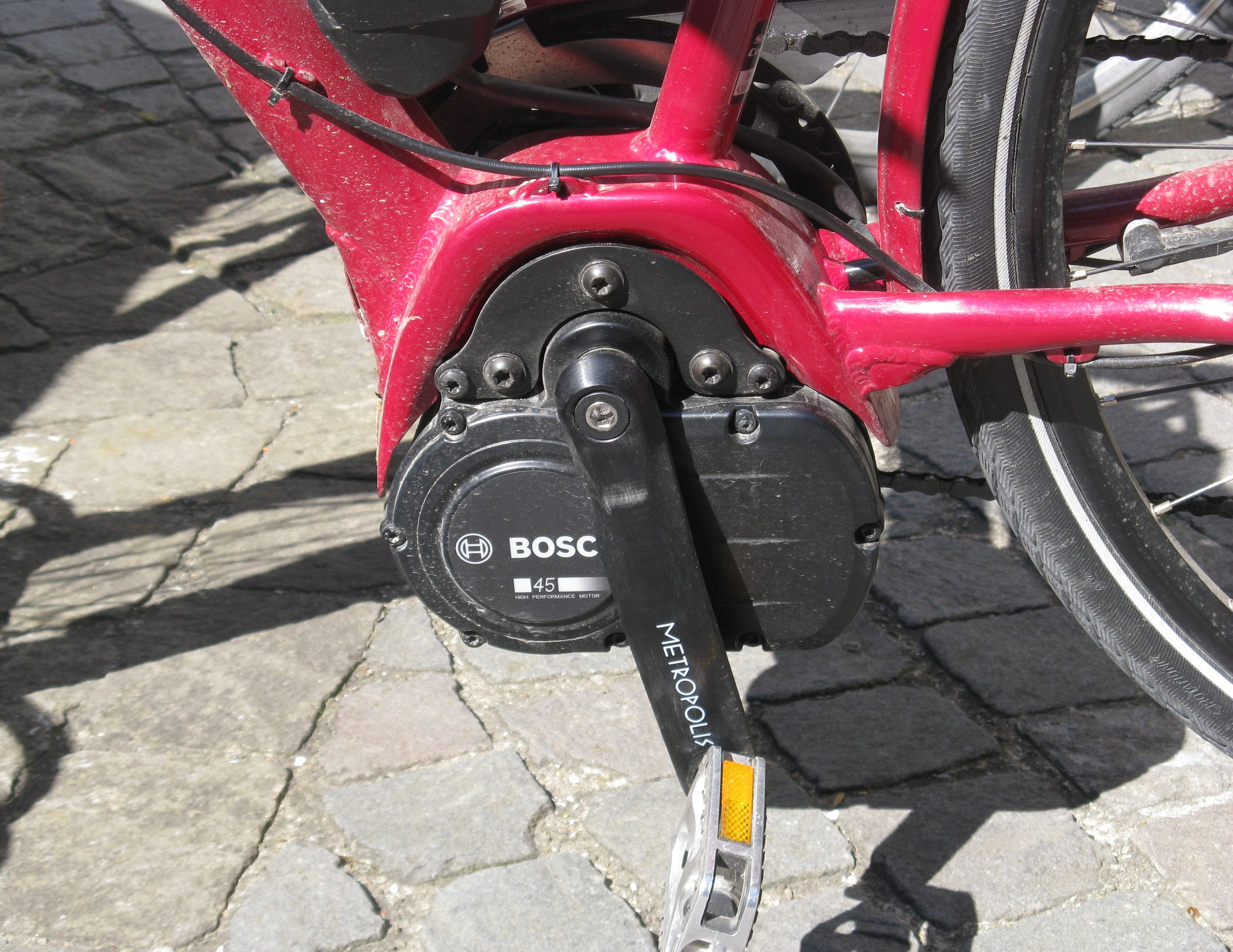 eBike-Mittelmotor, BOSCH